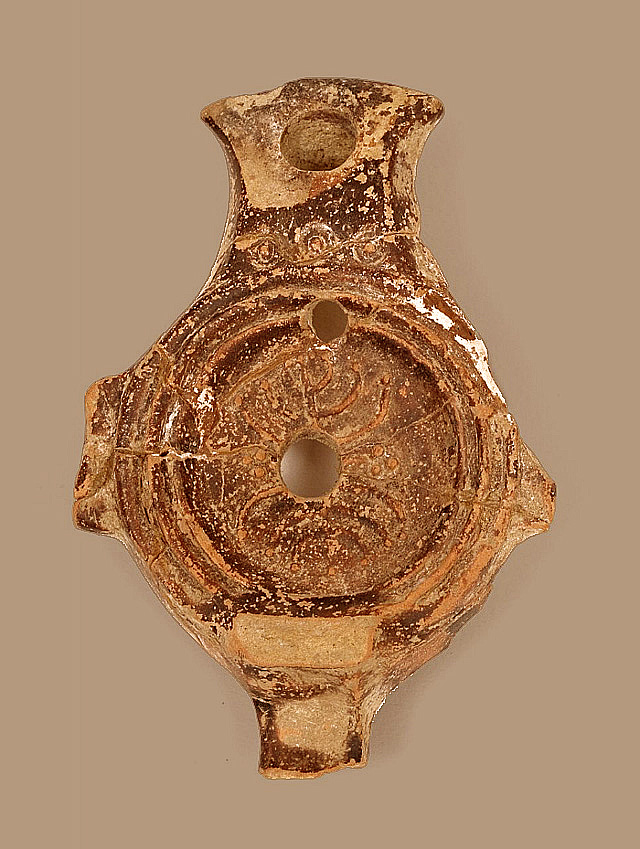 Lampe juive au chandelier à sept branches exposée au musée judéo-comtadin, ancienne synagogue de Cavaillon La petite lampe à huile conservée depuis sa découverte fortuite à Orgon en 1967 serait le plus ancien objet juif de Provence.